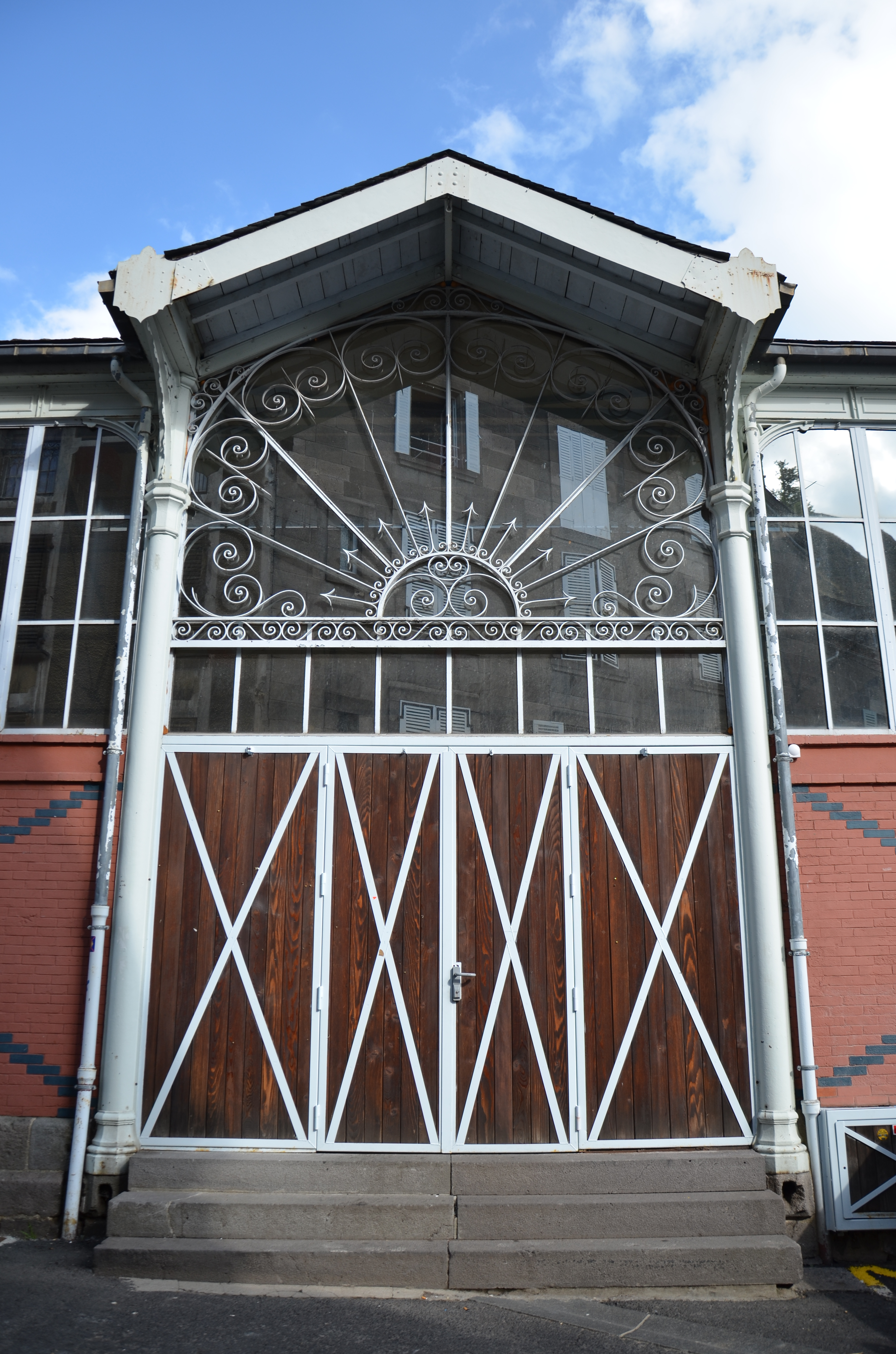 Halle (Inscrit) .